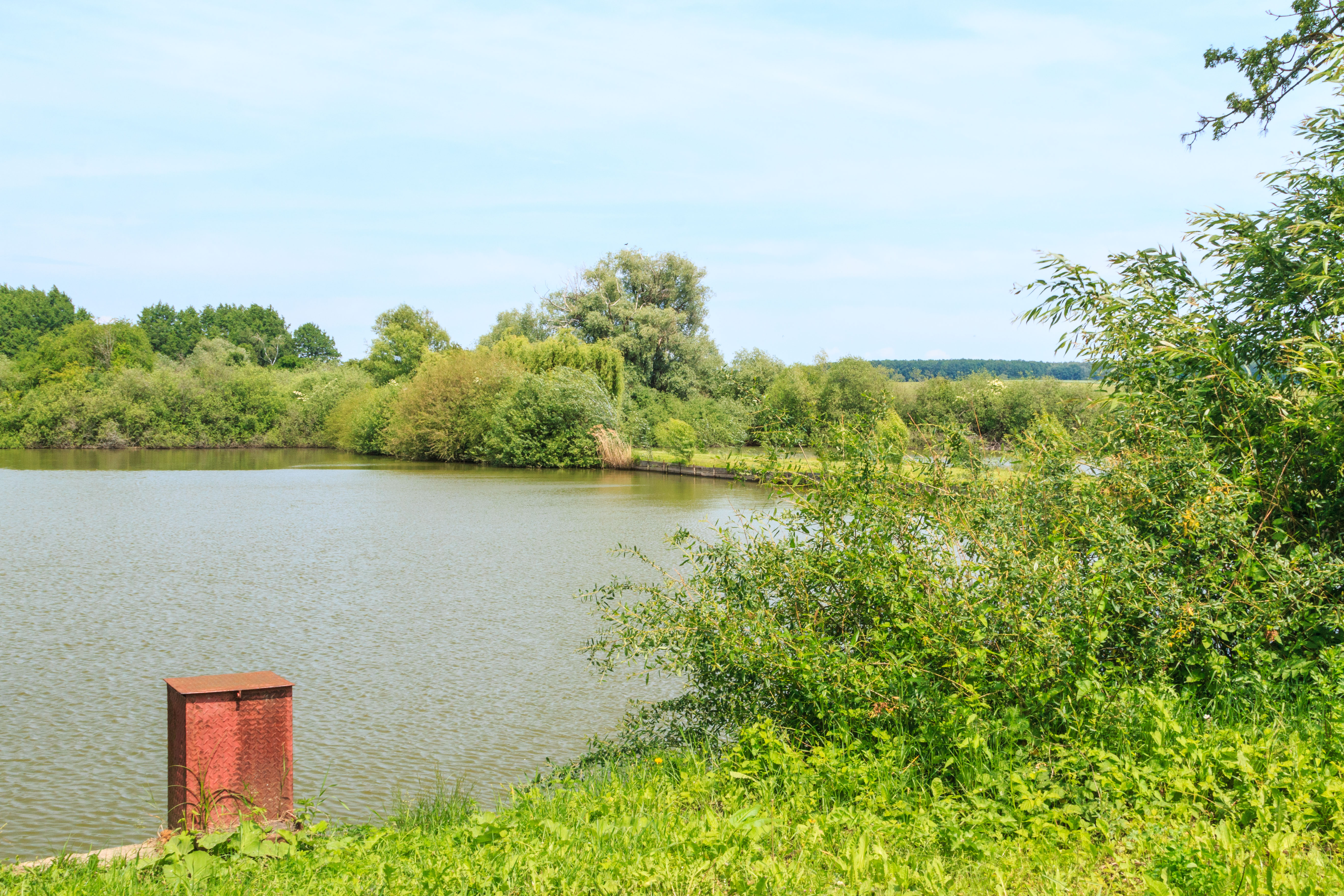 Rybník Šutrák u Kamenského Dvora Project: Vodstvo.